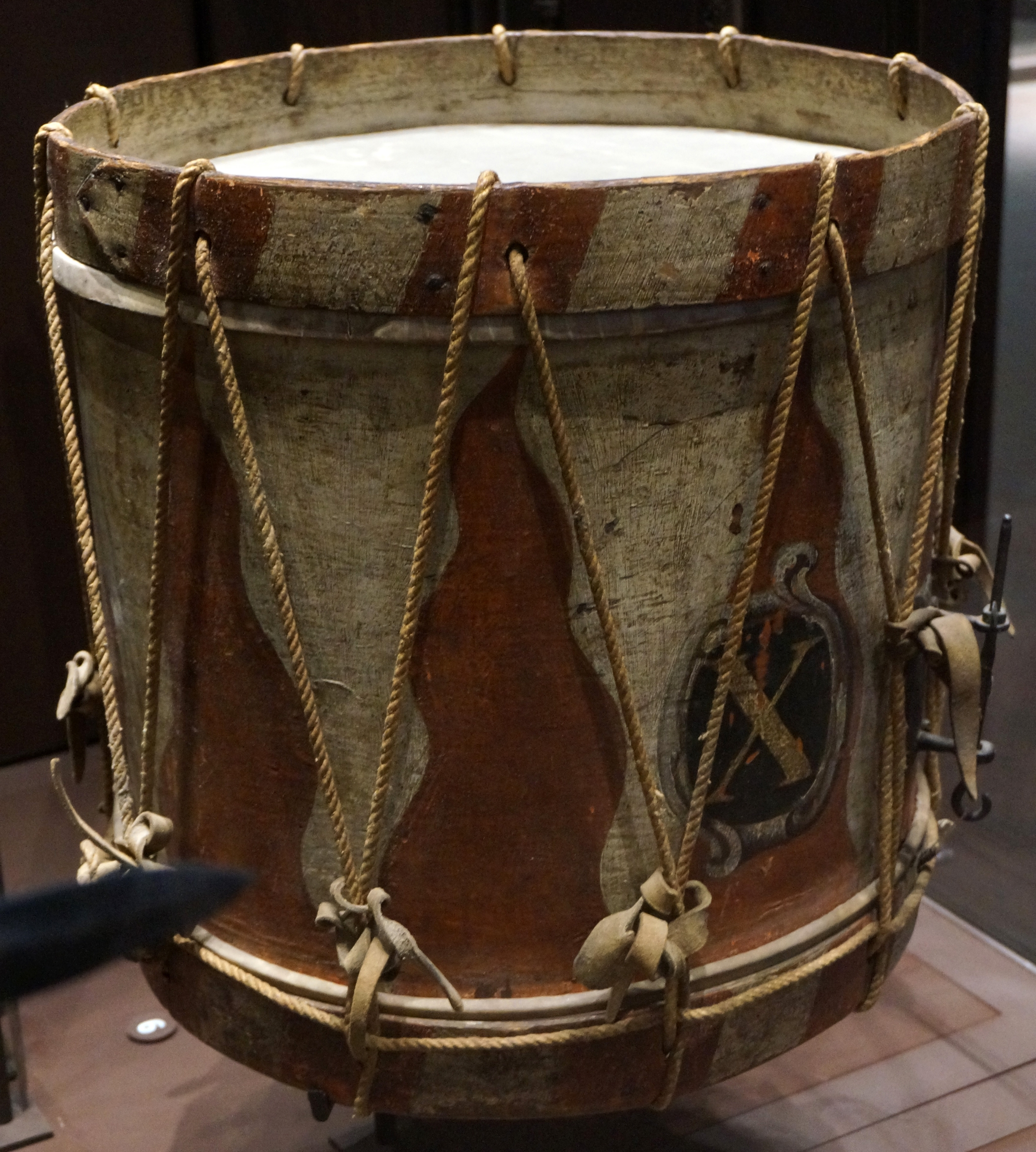 Musée de l'Armée - collection.